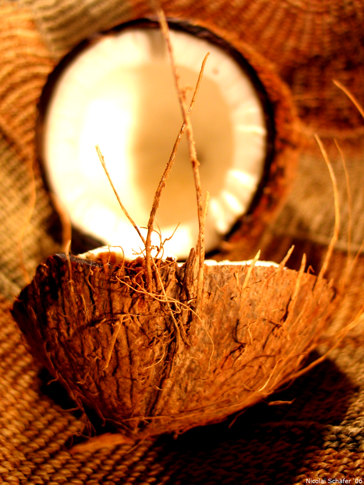 a just opened, mature coconut